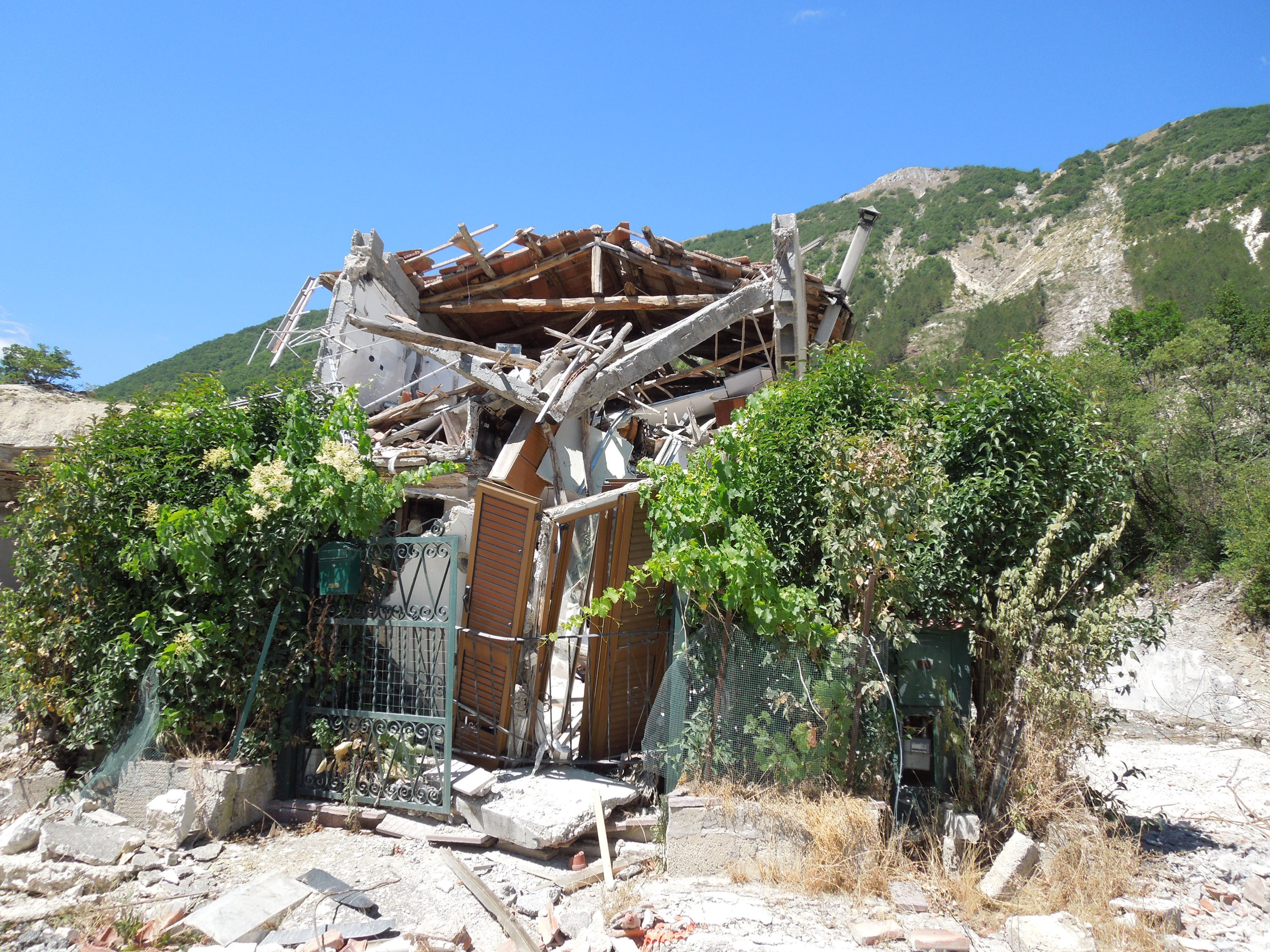 Particolare delle macerie di un'abitazione lungola Vecchia Salaria, oggi SP129, di Pescara del Tronto in provincia di Ascoli Piceno. Scatto eseguito all'interno della zona rossa il 27 luglio 2017.